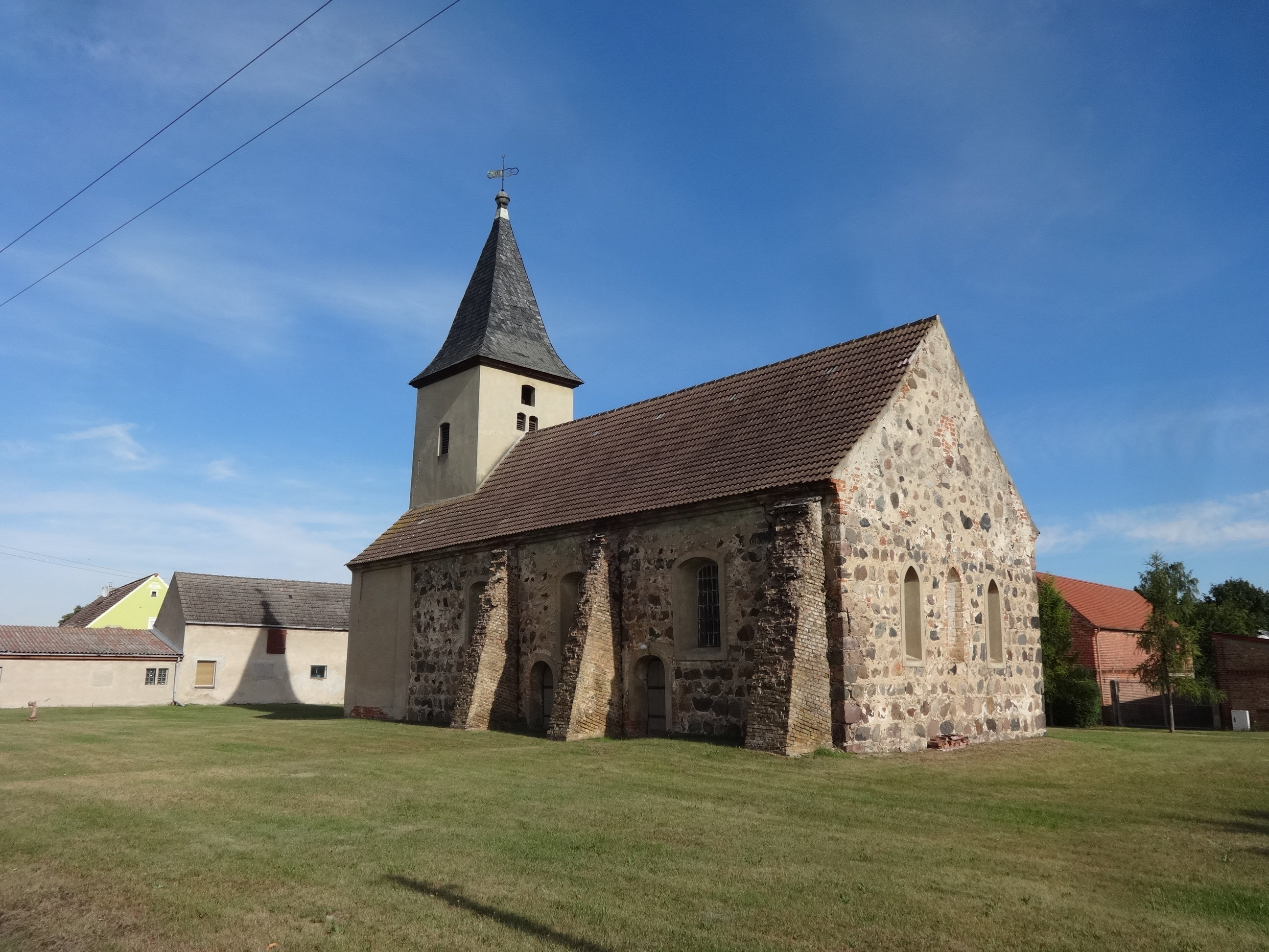 Die Dorfkirche in Kemnitz ist eine Saalkirche, die vermutlich in der ersten Hälfte des 14. Jahrhunderts aus Feldsteinen errichtet wurde. 1739 wurde der Kirchturm angebaut. Im Innern befindet sich ein hölzerner Kanzelaltar aus dem 18. Jahrhundert sowie eine Sakramentsnische.